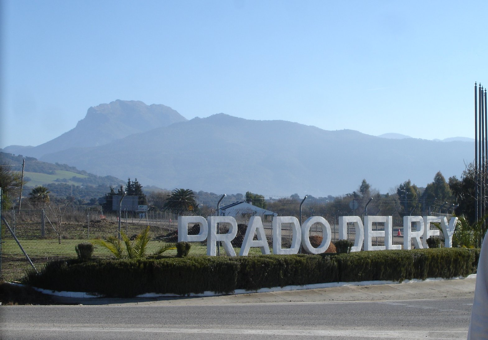 Entrada a Prado del Rey (Cádiz) desde la carretera de Arcos de la Frontera